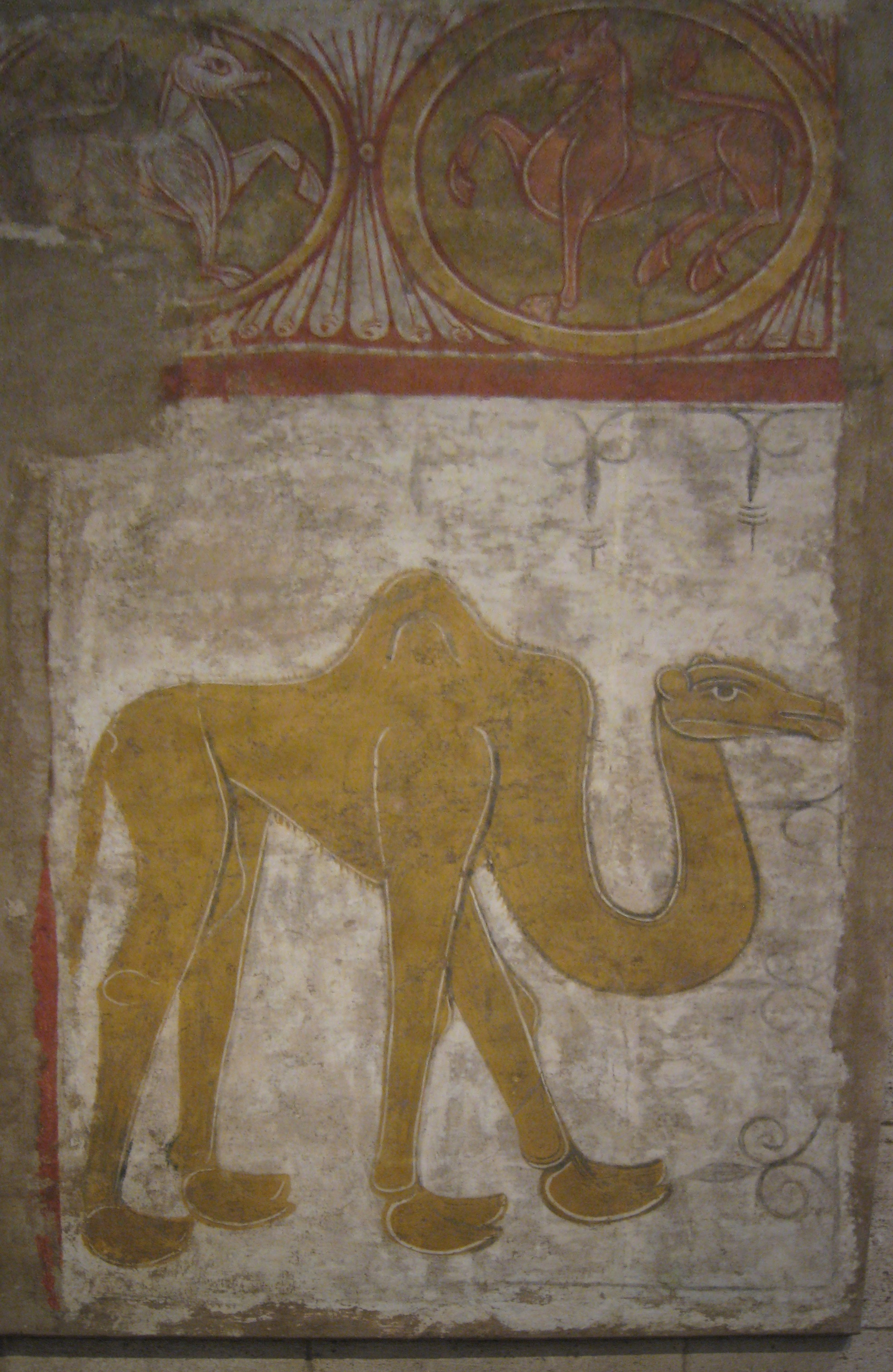 Camello en una pintura románica de San Baudelio de Berlanga en el Cloister Museum de Nueva York, procedente de España, 1120-1140